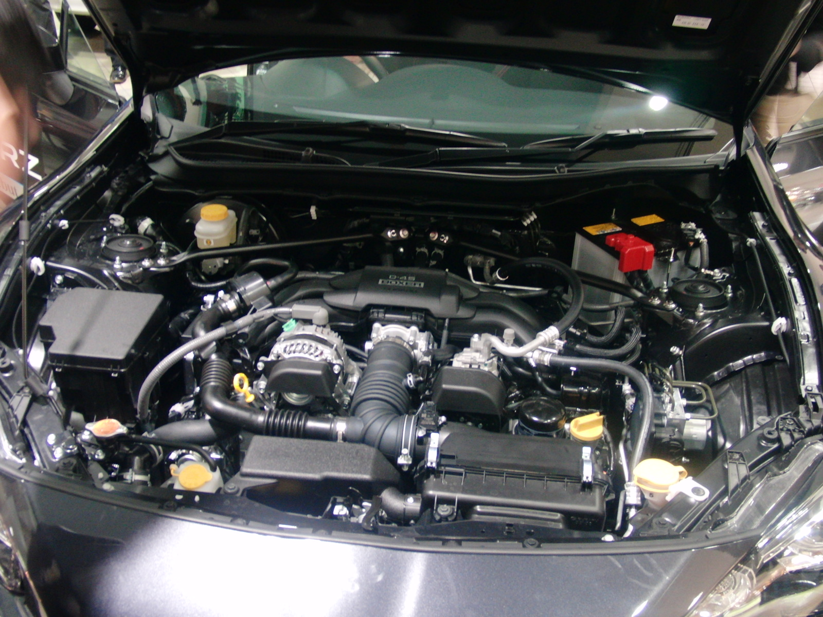 スバル・BRZのエンジンルーム